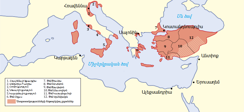 Բյուզանդական կայսրության բանակաթեմերը 717 թ-ին